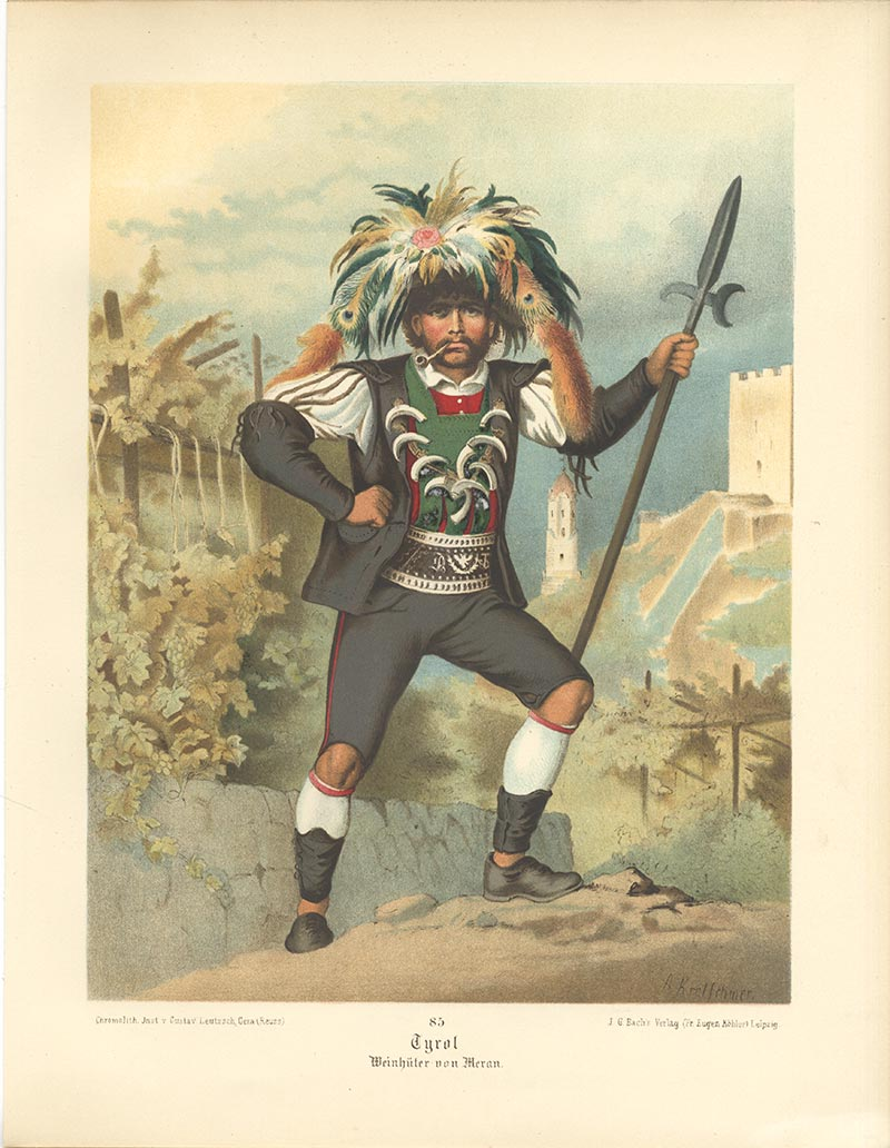 Deutsche Volkstrachten, Original-Zeichnungen mit erklärendem Text